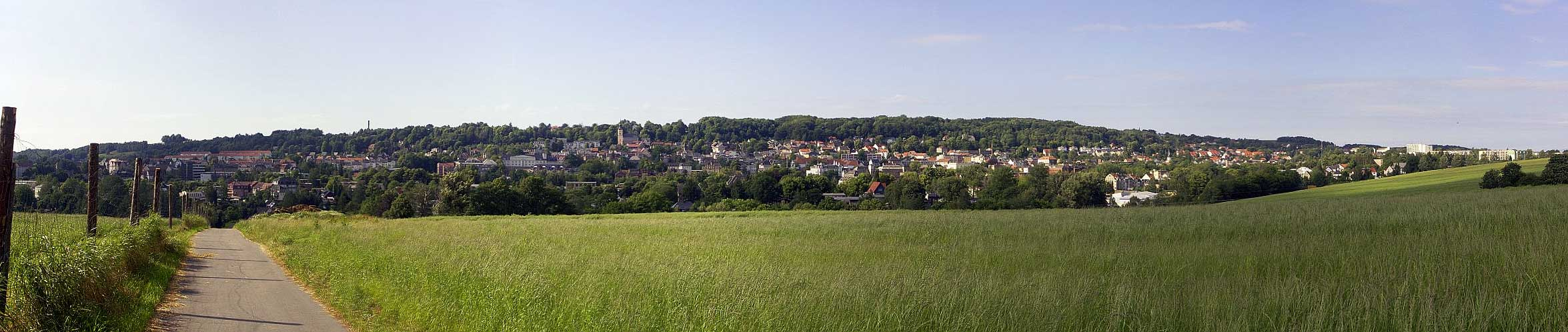 Teilpanorama von Hohenstein Ernstthal / Sommer 2004 (Blick vom Ankerberg Oberlungwitz)